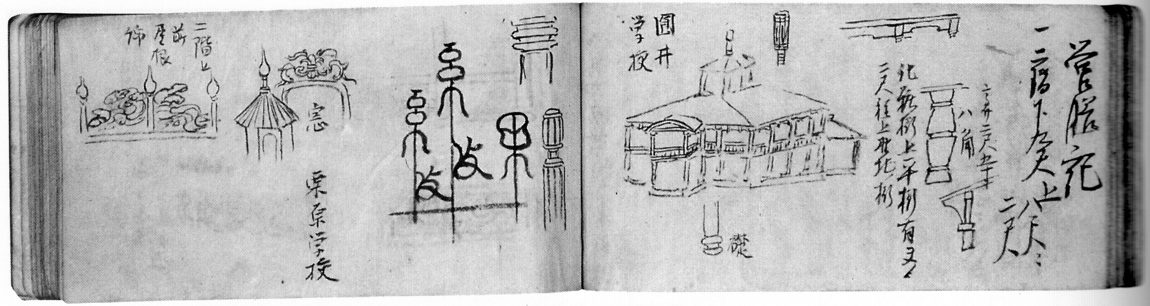 大工棟梁の立石清重が、開智学校を建設するにあたって上京した際の記録「東京出府記」に付随するスケッチ集「営繕記」。